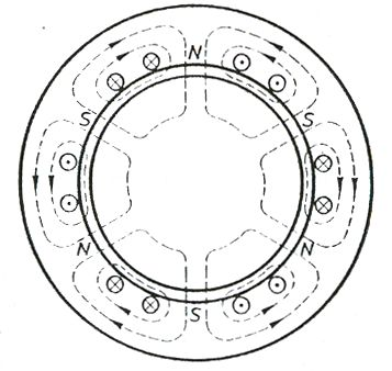 Figura 13.Makina gjashtëpolare e realizuar në formë cilindrike me eksitim ne stator.